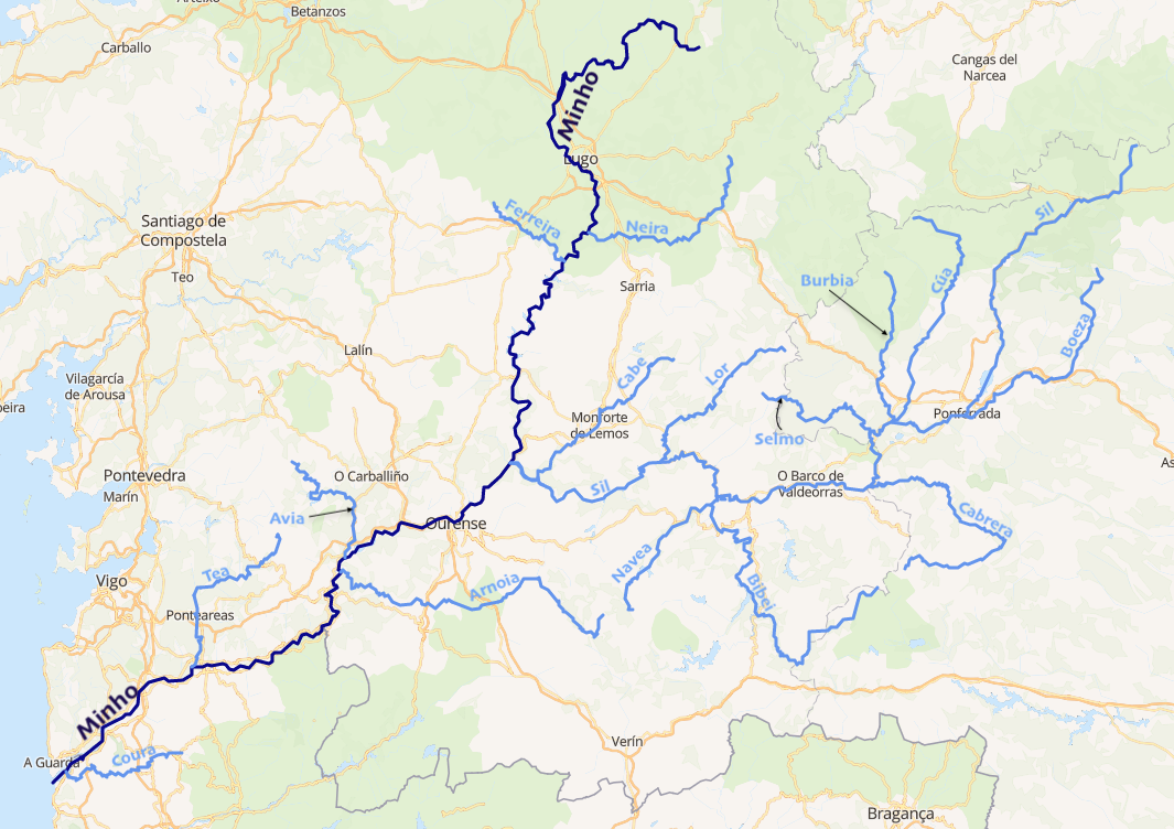 carte réalisée sur umap This map may be incomplete, and may contain errors. Don't rely solely on it for navigation.